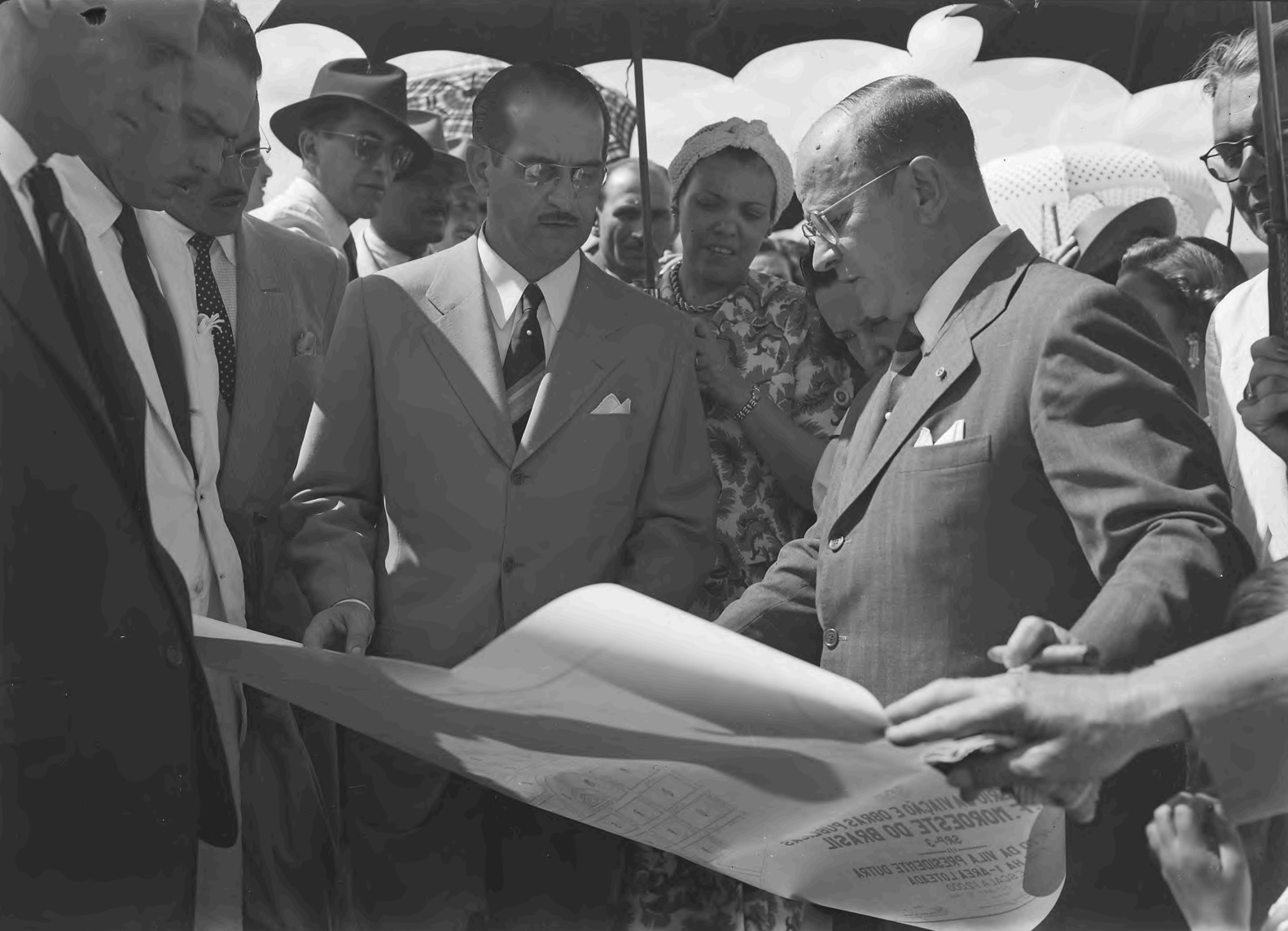 O vice-governador Novelli Junior (ao centro) vistoriando o local de construção da Vila Ferroviária Presidente Dutra, localizada em Bauru, próximo da estação Curuçá da Estrada de Ferro Noroeste do Brasil. Imagem do Arquivo Nacional, código BR RJANRIO EH.0.FOT, PPU.5411.